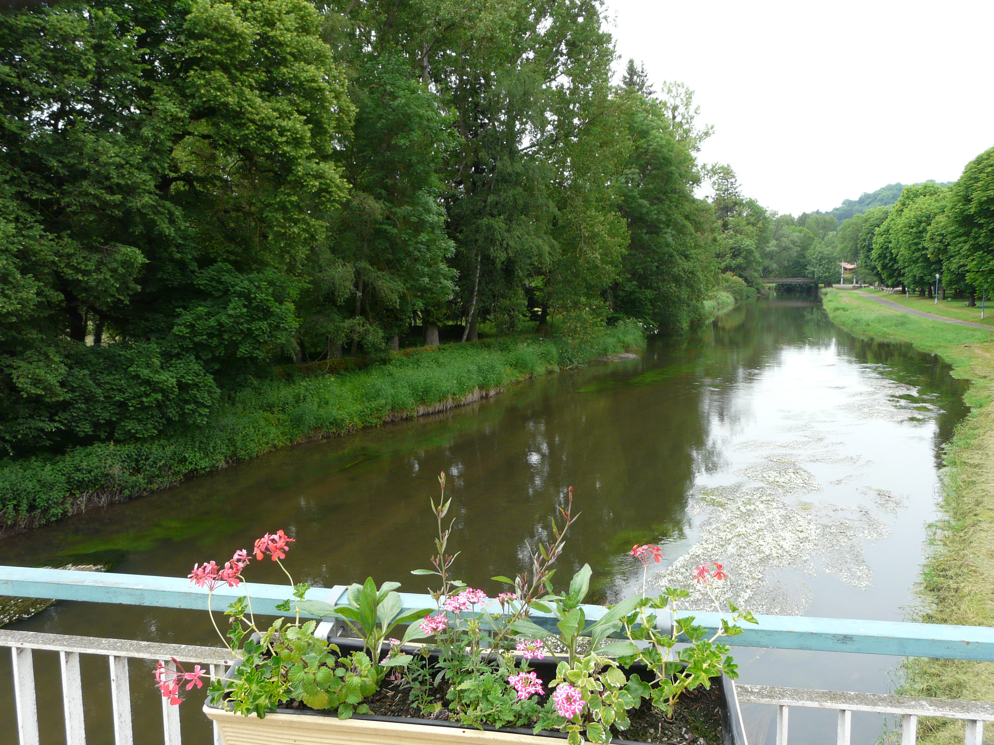 La Sioule en amont du pont de la route départementale 943, Pontgibaud, Puy-de-Dôme, France.